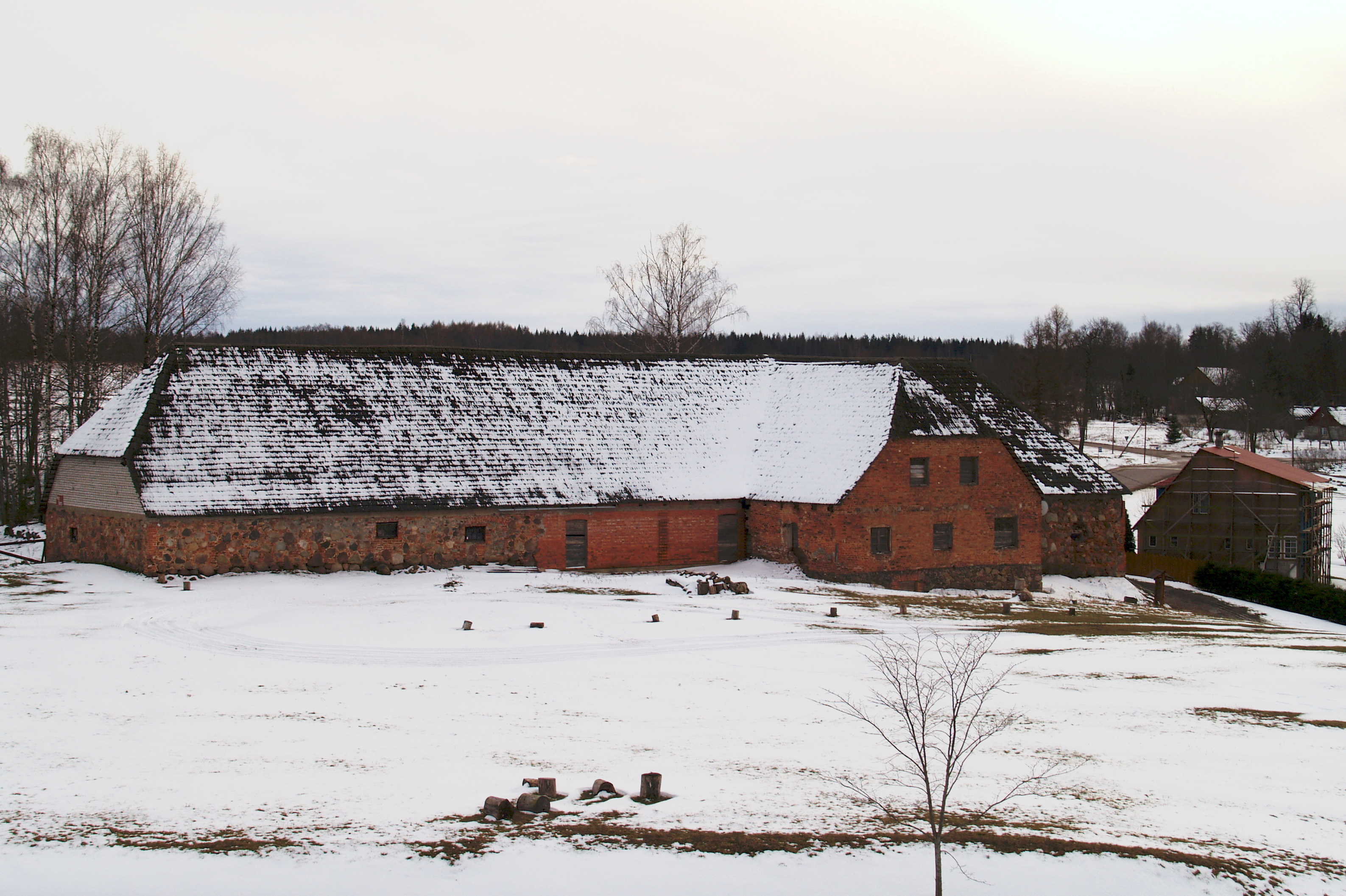 Piiri kõrts talvel Vastseliina linnuse poolt vaadatuna